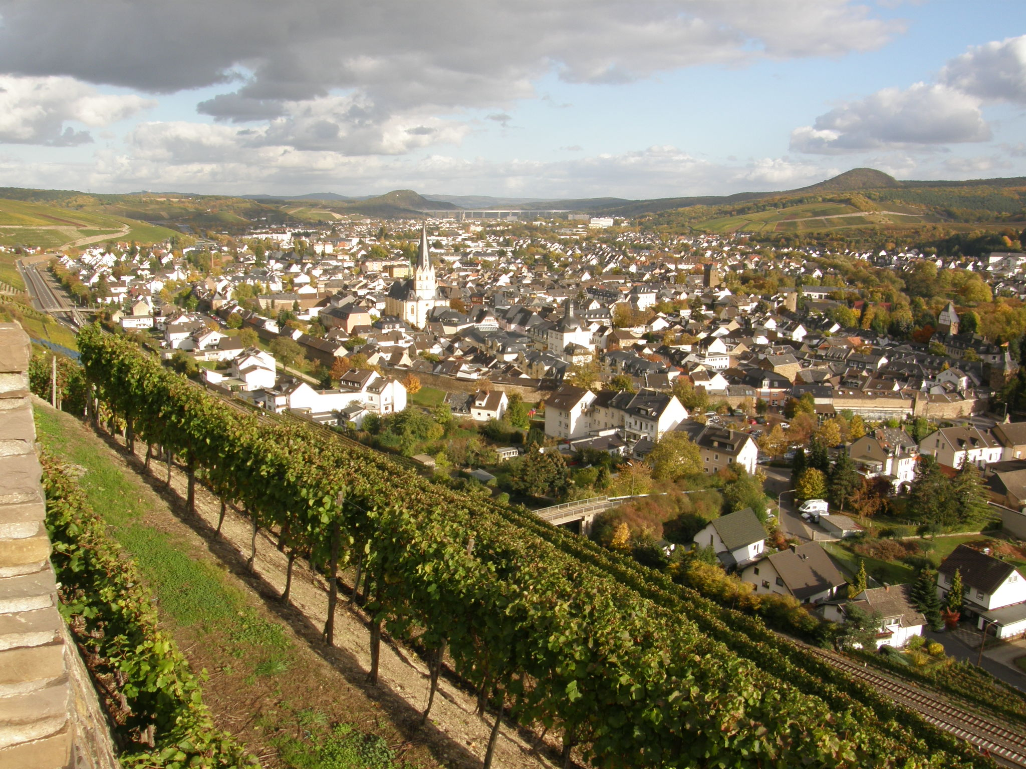 Bad Neuenahr-Ahrweiler. Ahrweiler v popředí.